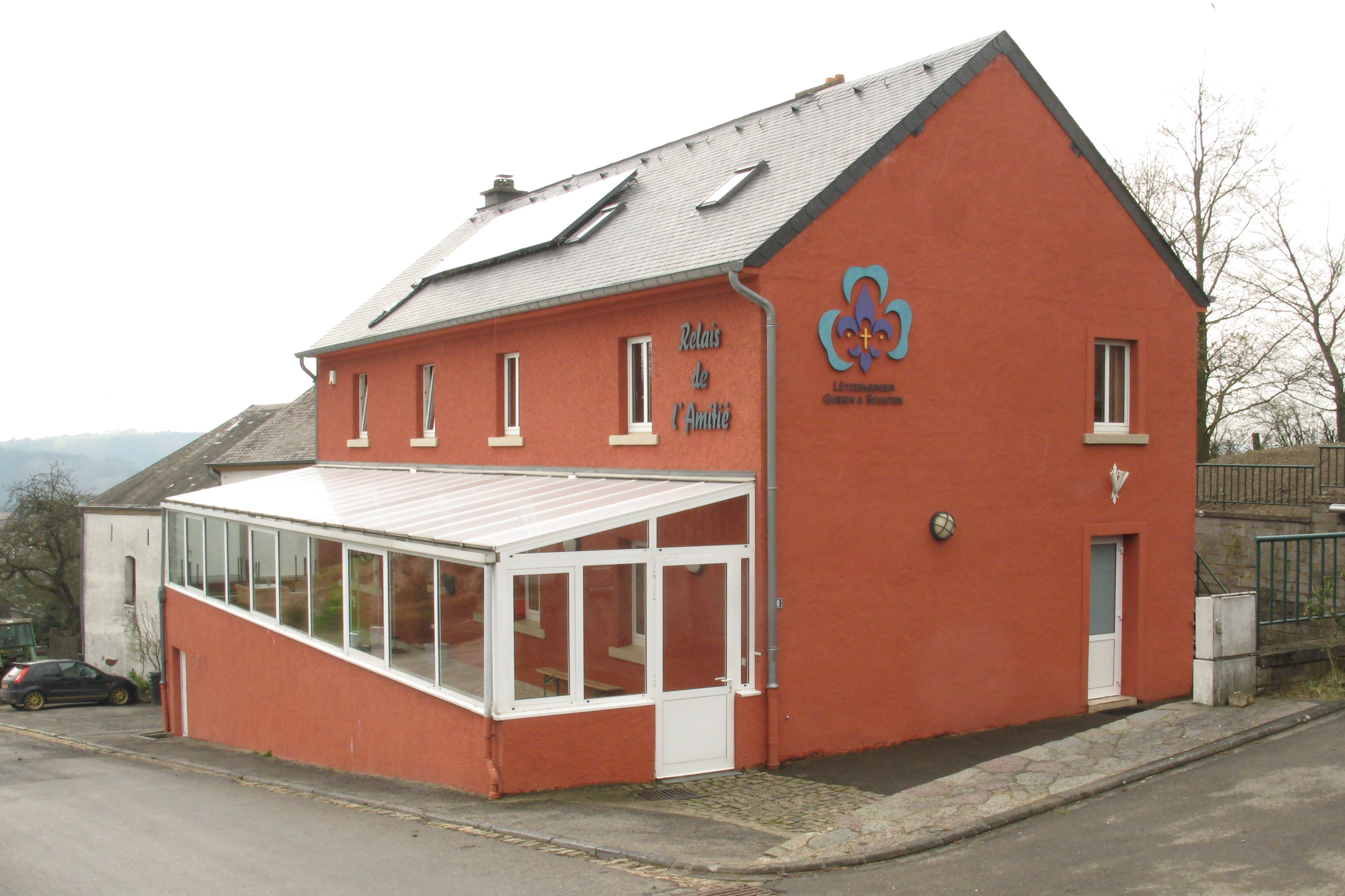 De Relais de l'Amitié zu Bilschdref Abrëll 2010. Relais Relais